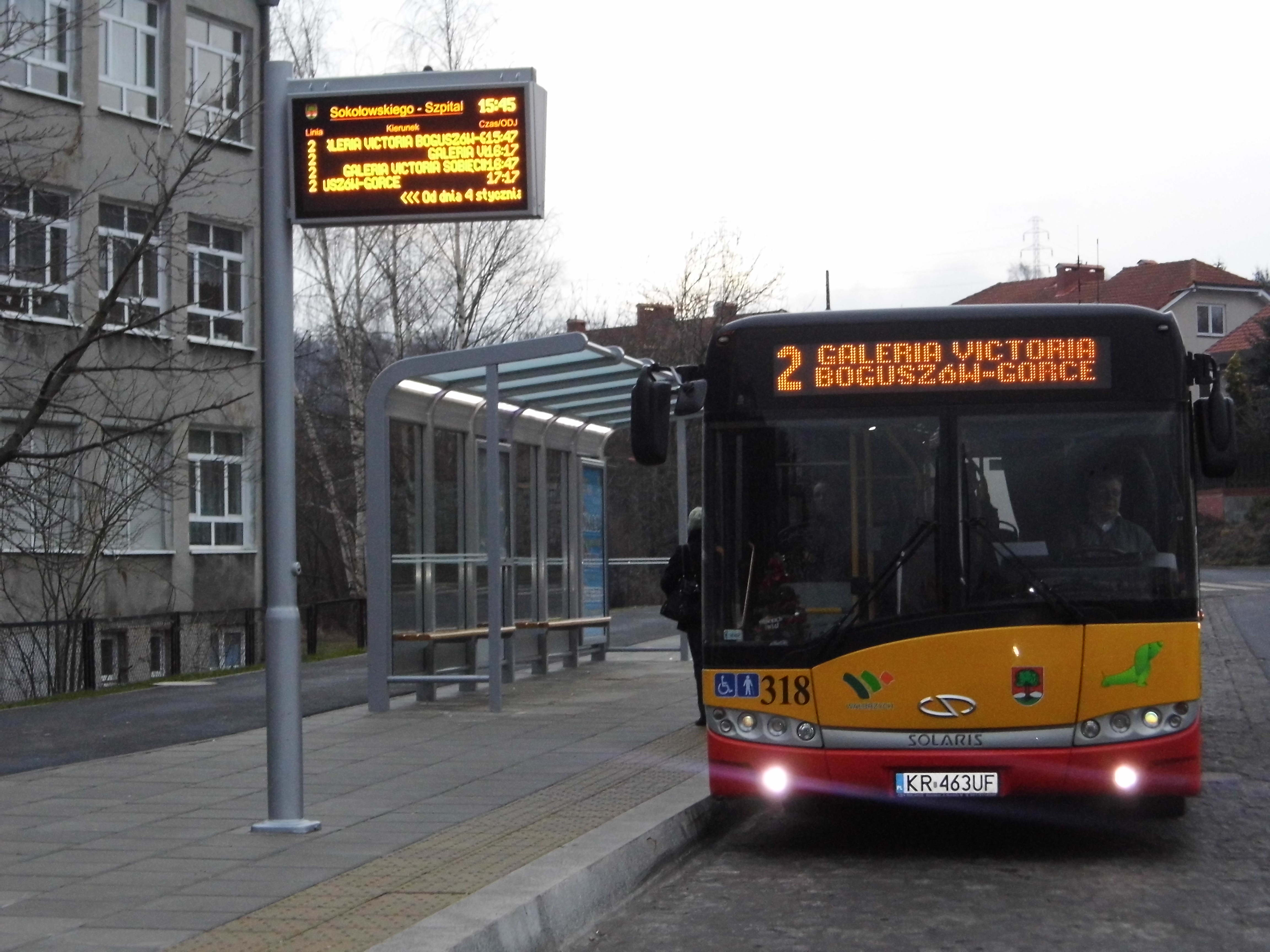 Autobus ZDKiUM Wałbrzych